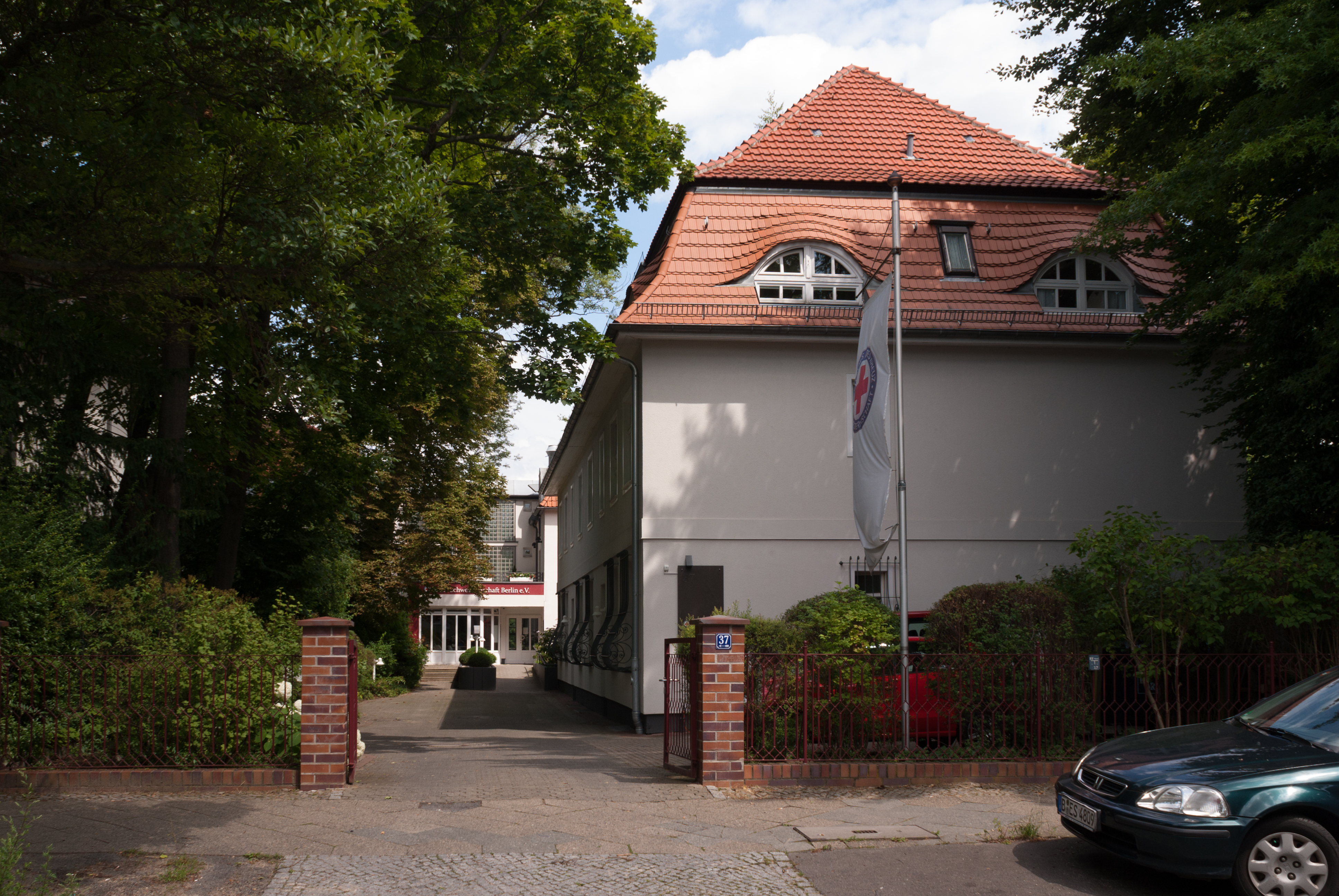 Sitz der Rotkreuz-Schwesternschaft Berlin, Mozartstraße 37, Berlin-Lankwitz